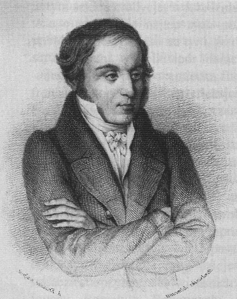 Kazimierz Brodziński. Lepsza wersja starej grafiki.